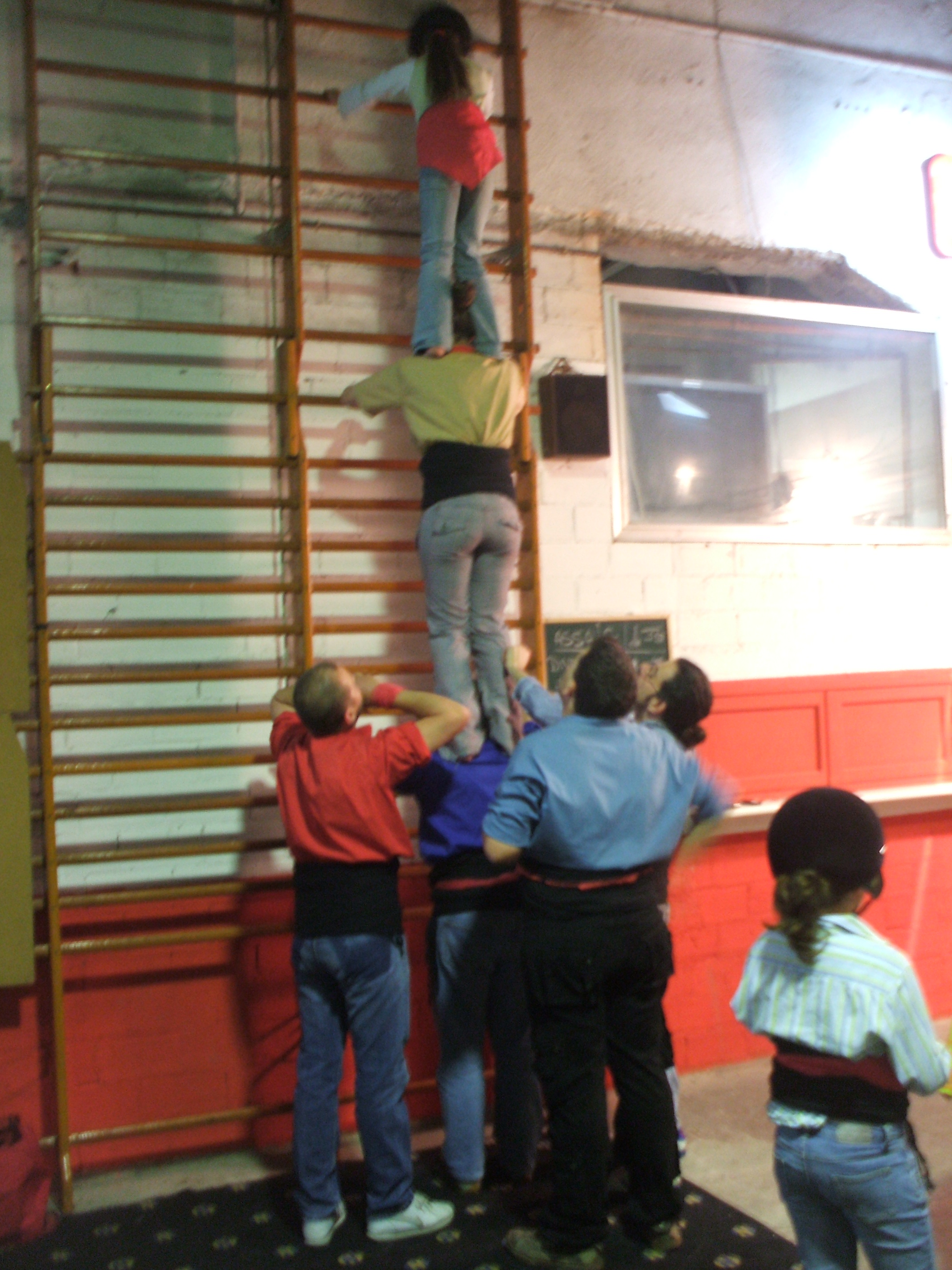 Assaig de rengla dels Castellers de Rubí.